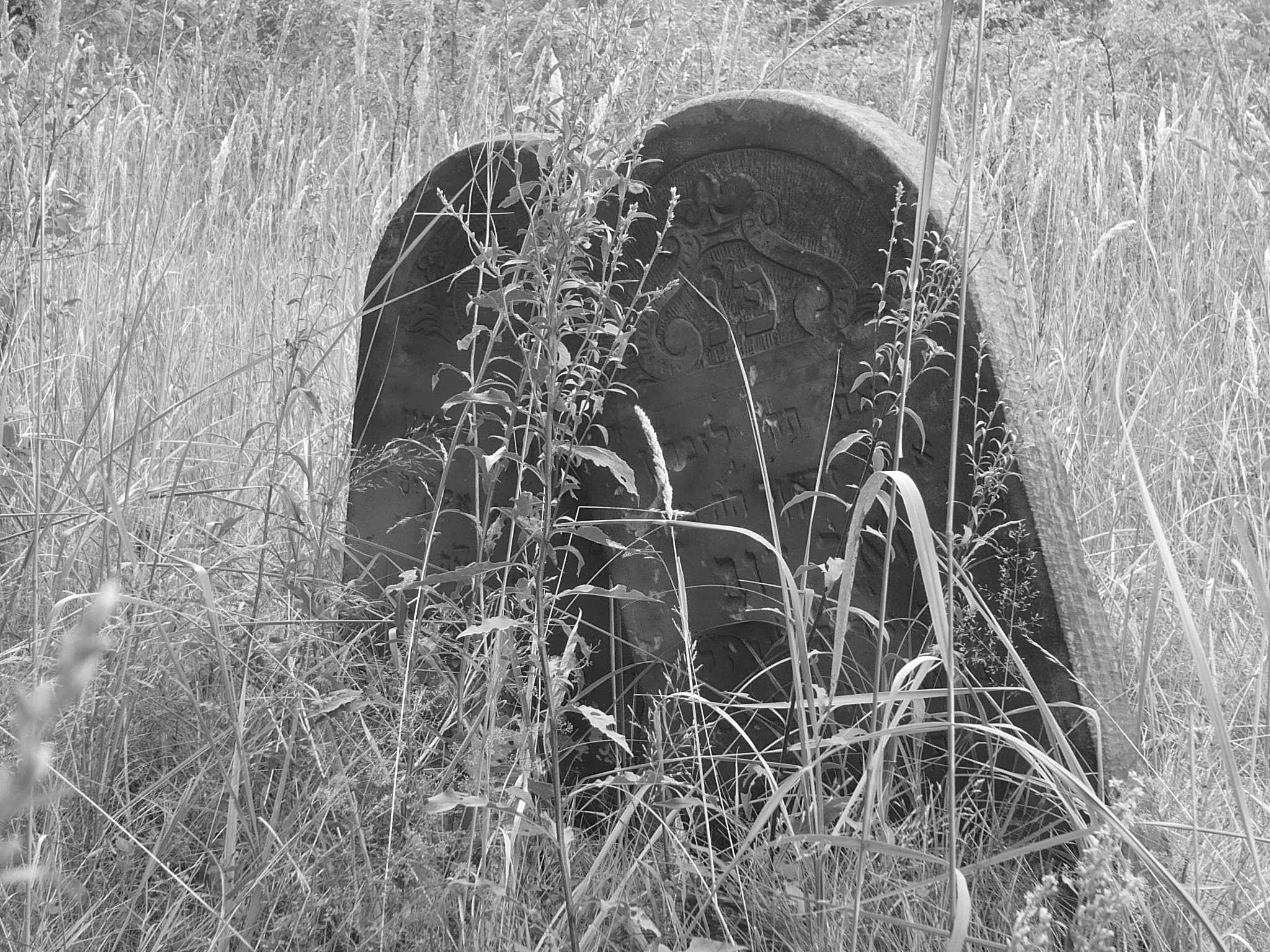 Macewy na cmentarzu żydowskim w Radomsku